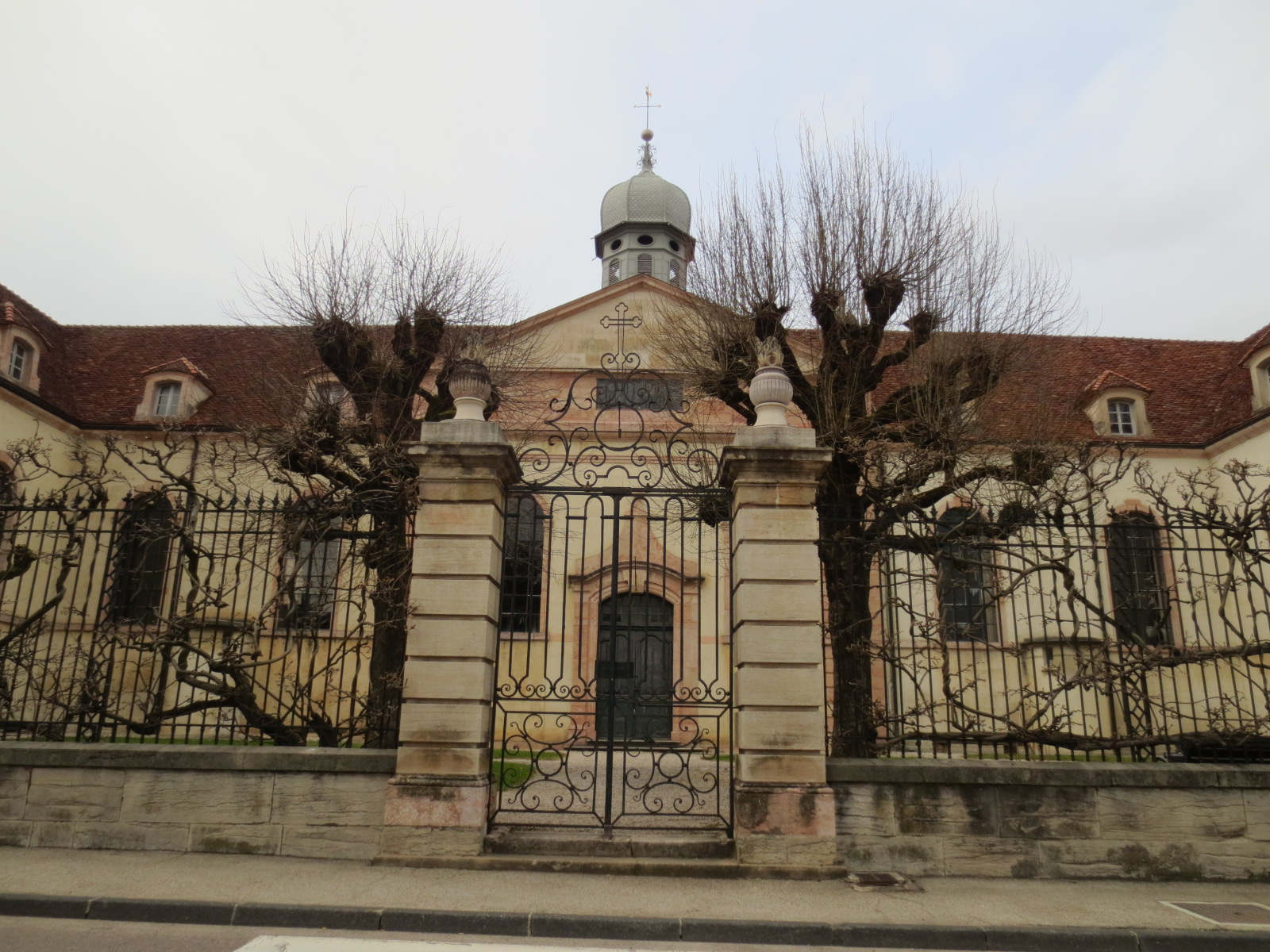 Hôtel-Dieu de Louhans